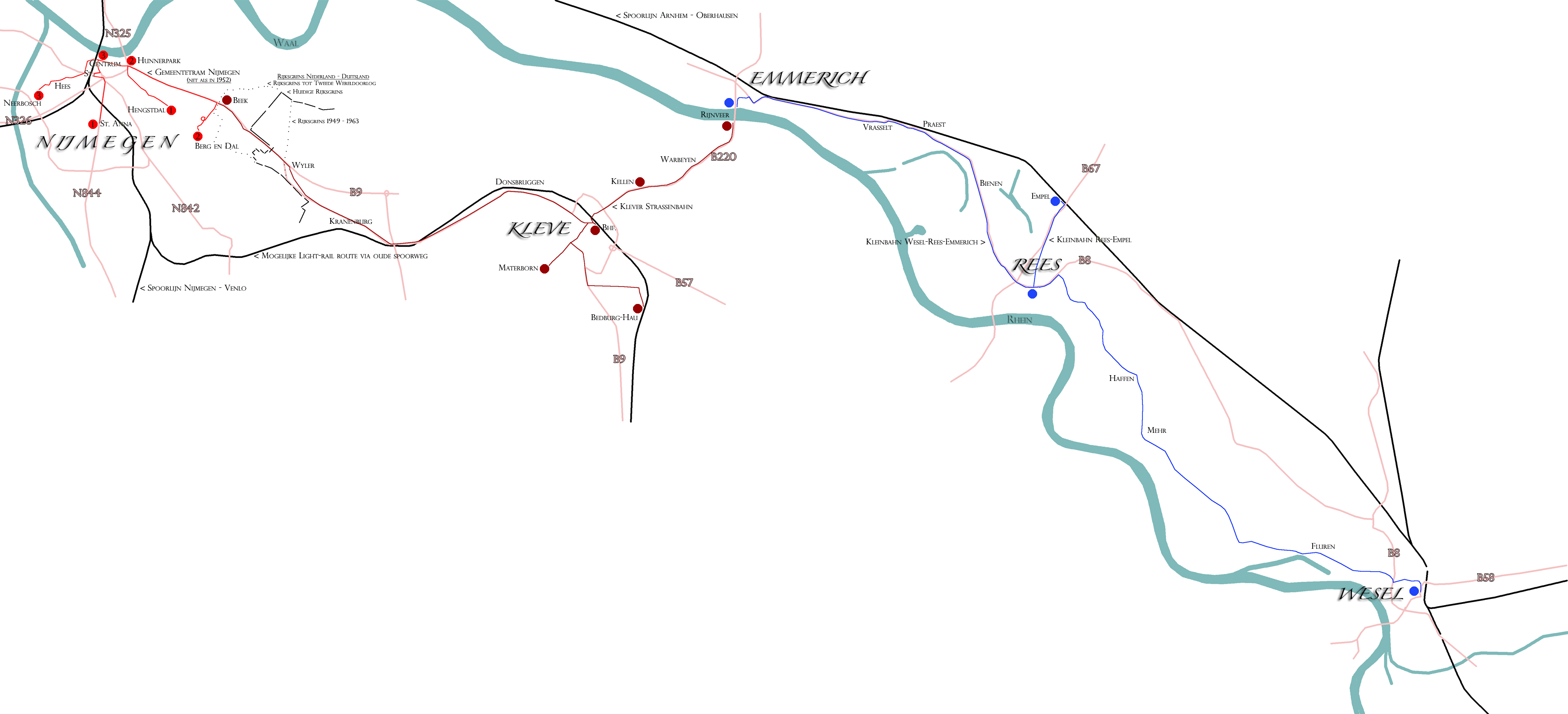 Tramnet tussen Nijmegen en Wesel, rond 1949. Toont ook de route van de spoorlijn Kleve-Nijmegen